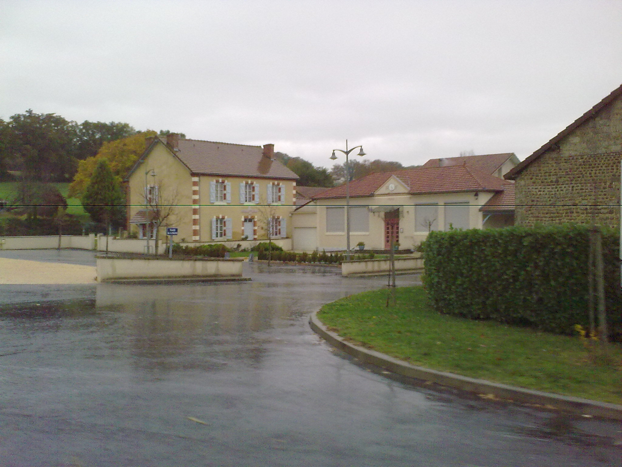 Taron-Sadirac-Viellenave, France.